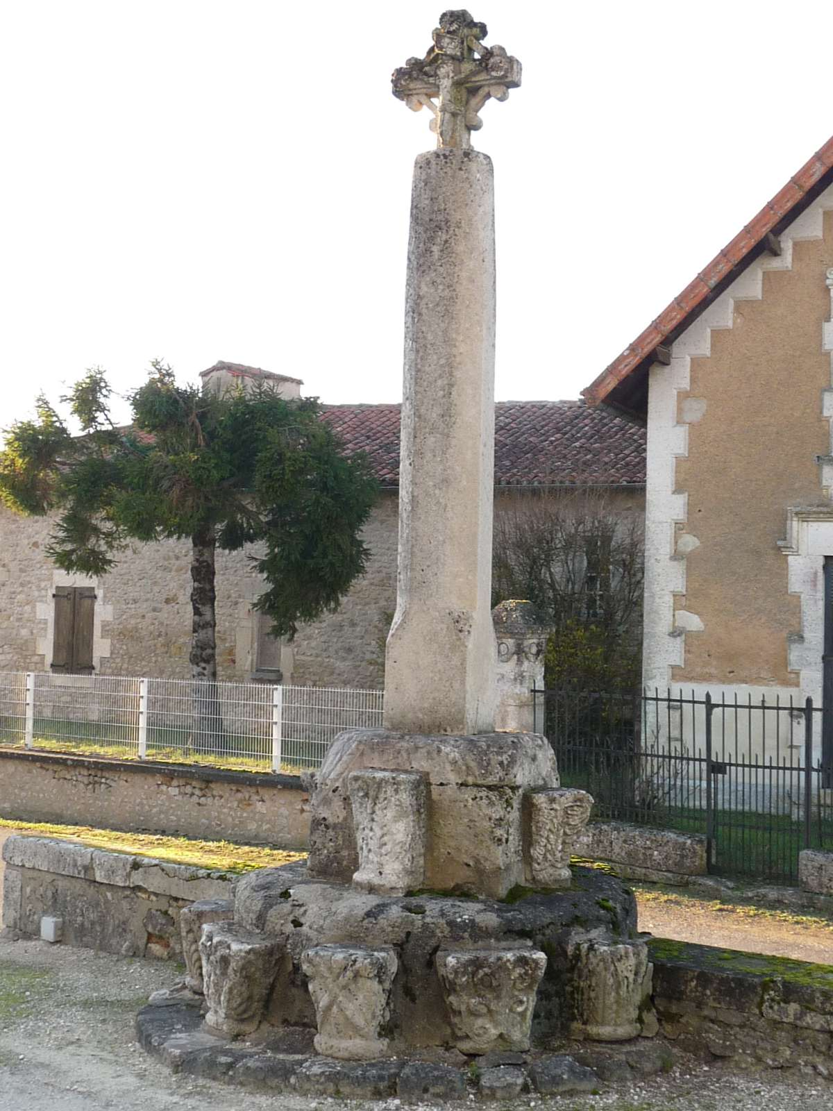 croix, place de l'église, Pérignac, Charente, France